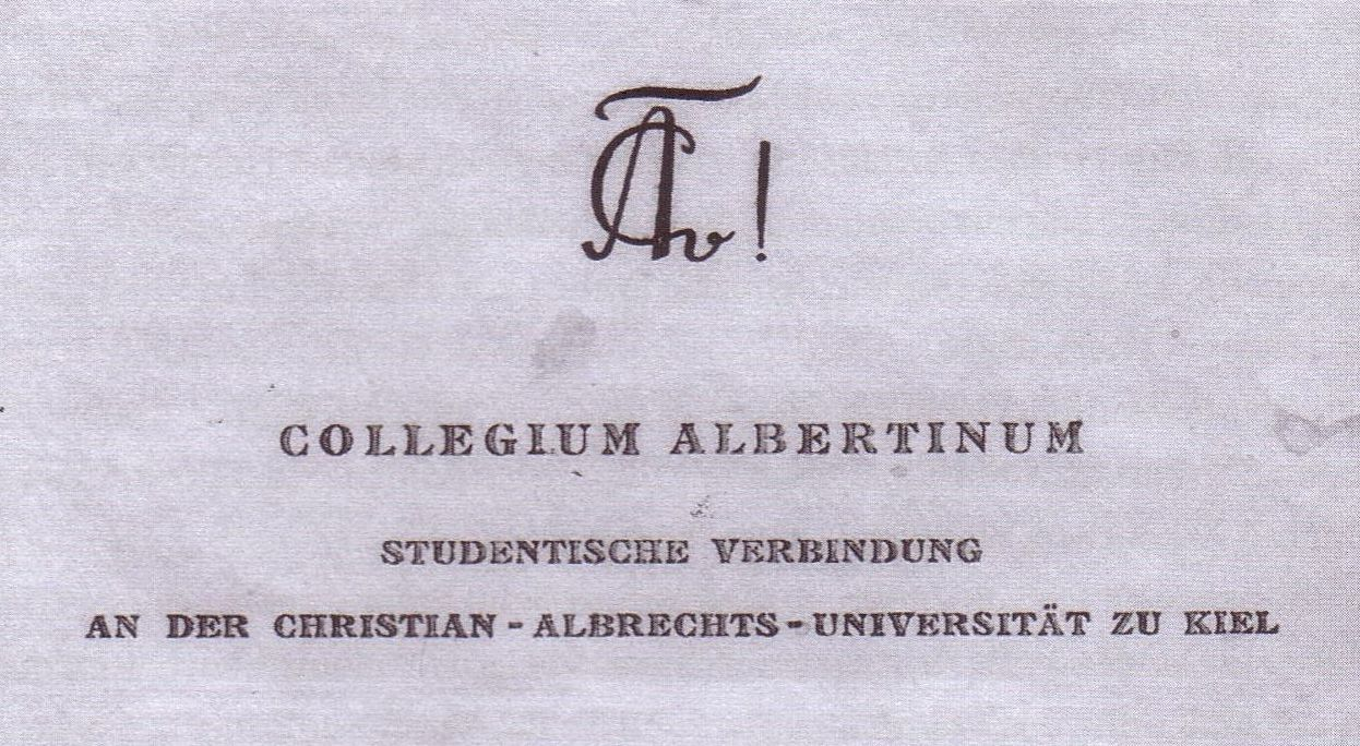 Zirkel des Collegium Albertinum (Kiel).